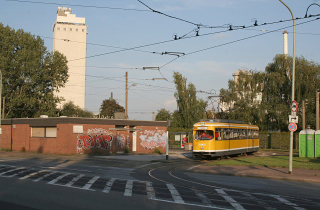 Straßenbahn-Endhaltestelle Rheinhafen, Linn, Krefeld